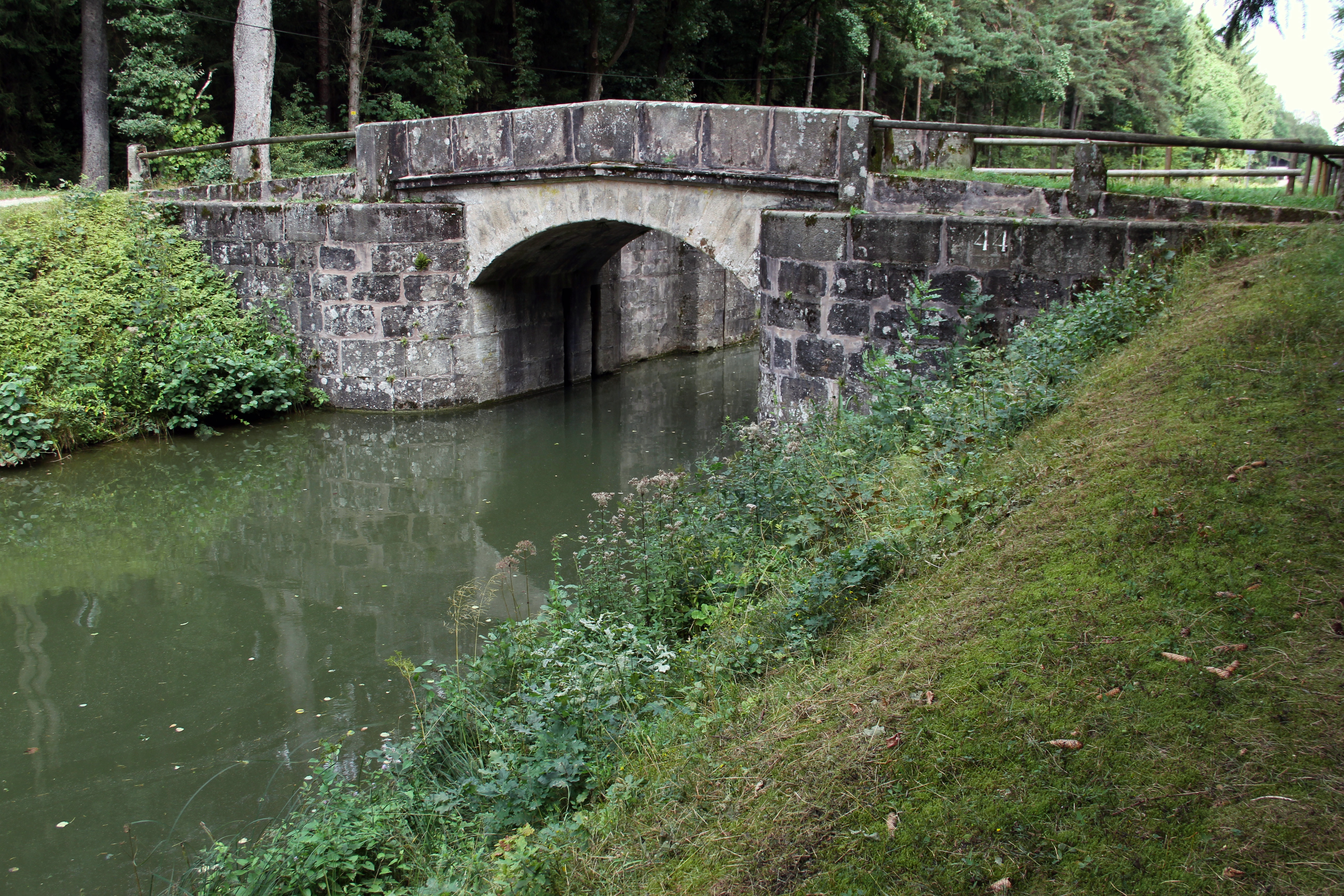 Schleuse 44, Ludwig-Donau-Main-Kanal